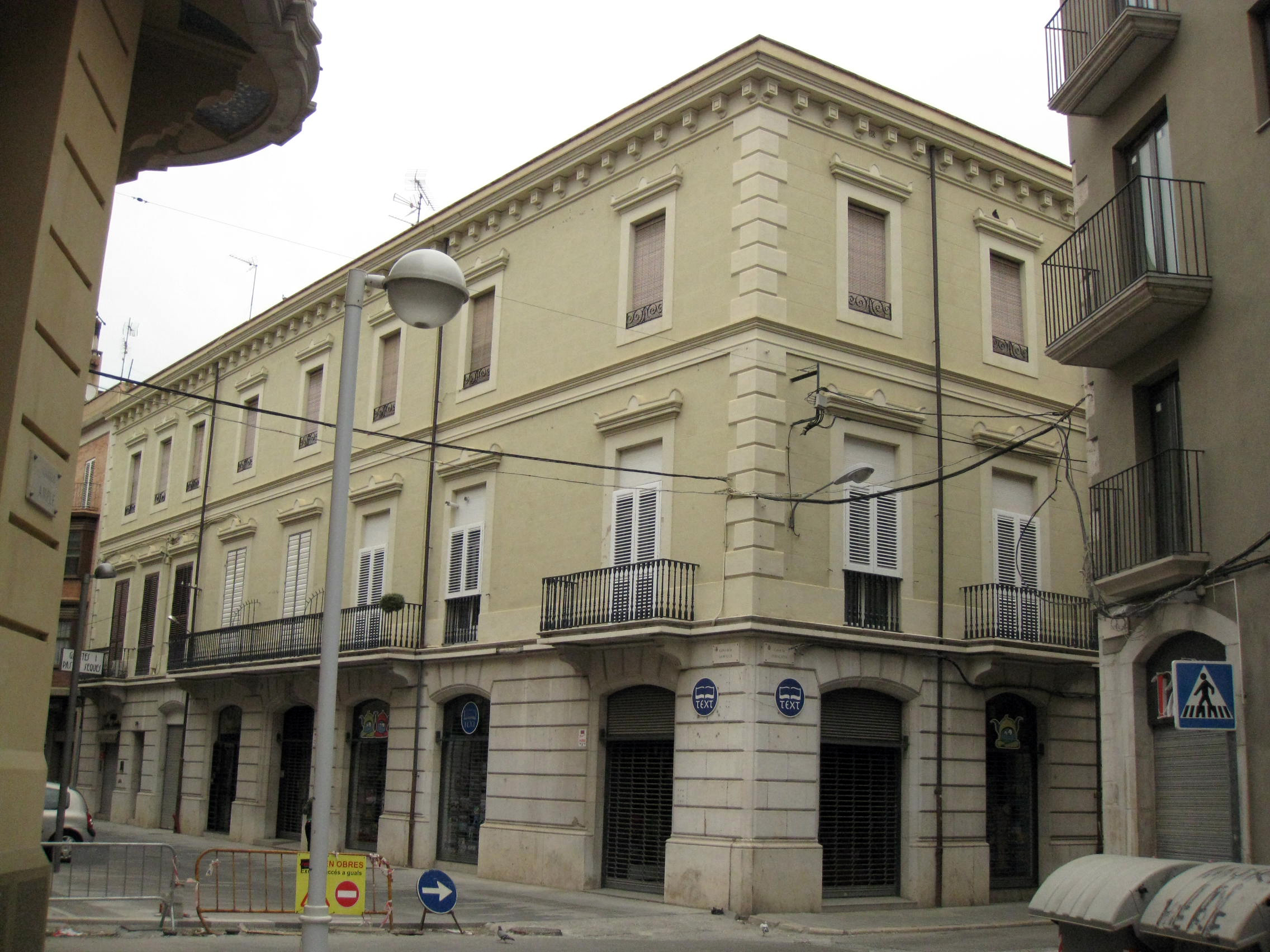 Casa al carrer Muralla, 23 (Figueres)